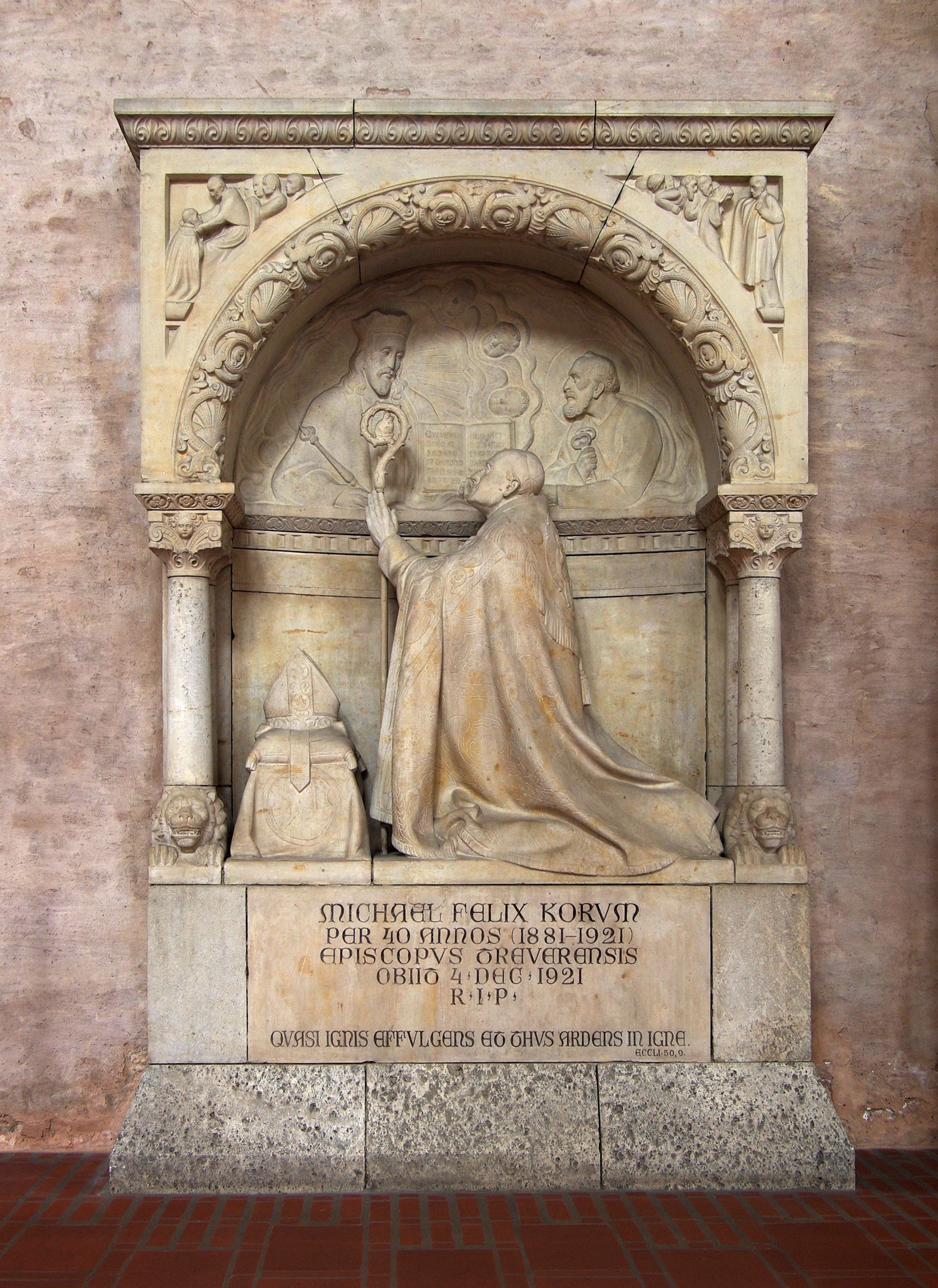 Trierer Dom, linkes Seitenschiff, Grabdenkmal Bischof Michael Felix Korum